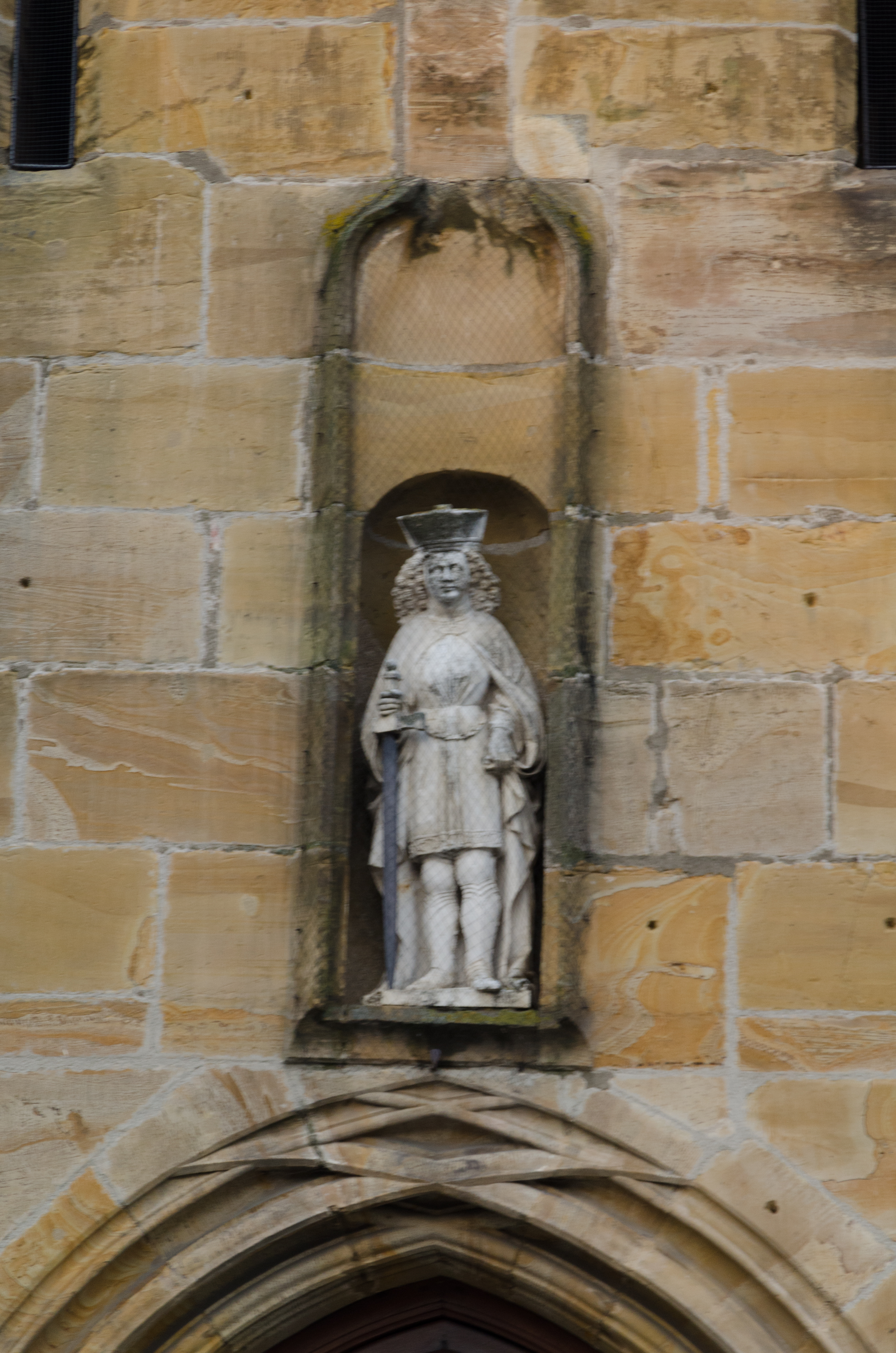 Oettingen in Bayern, Katholische Pfarrkirche St. Sebastian